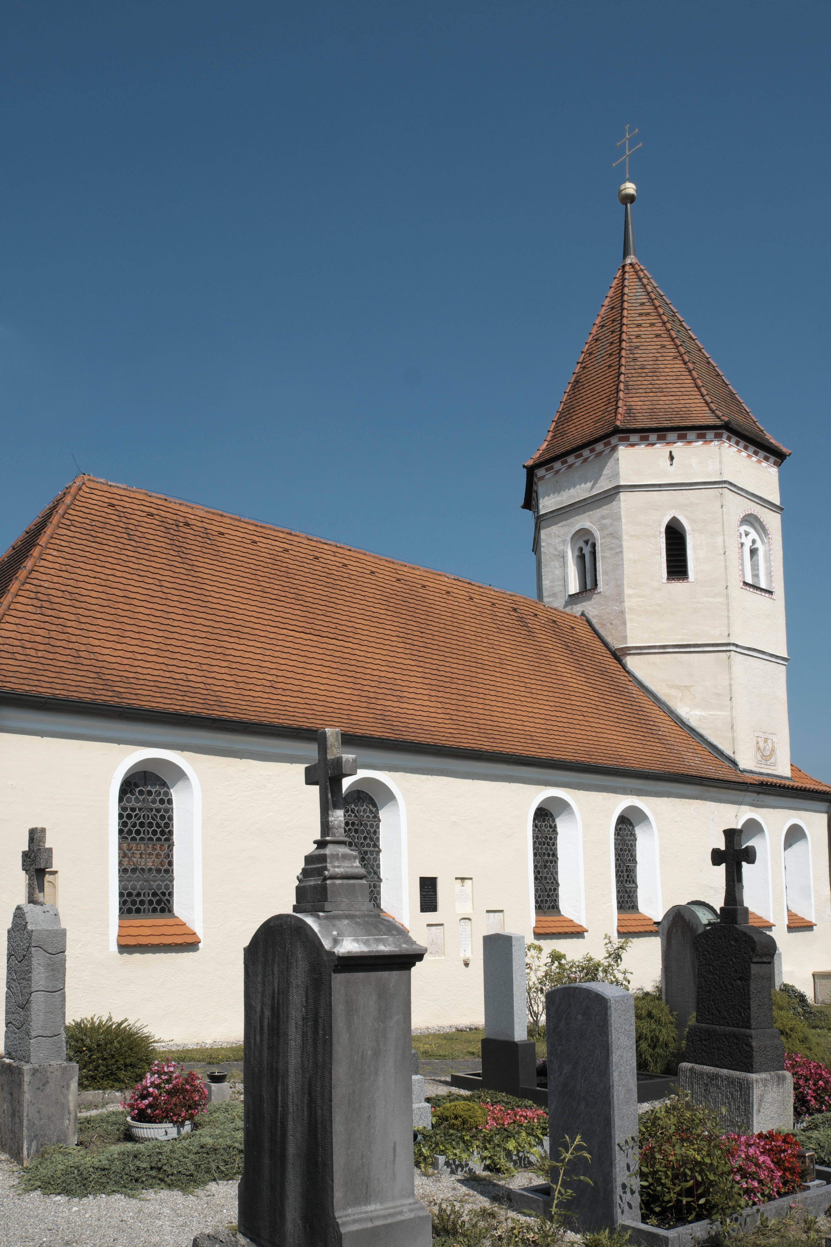 Alte katholische Pfarrkirche St. Georg in Oberpfaffenhofen (Weßling) im Landkreis Starnberg (Bayern, Deutschland)